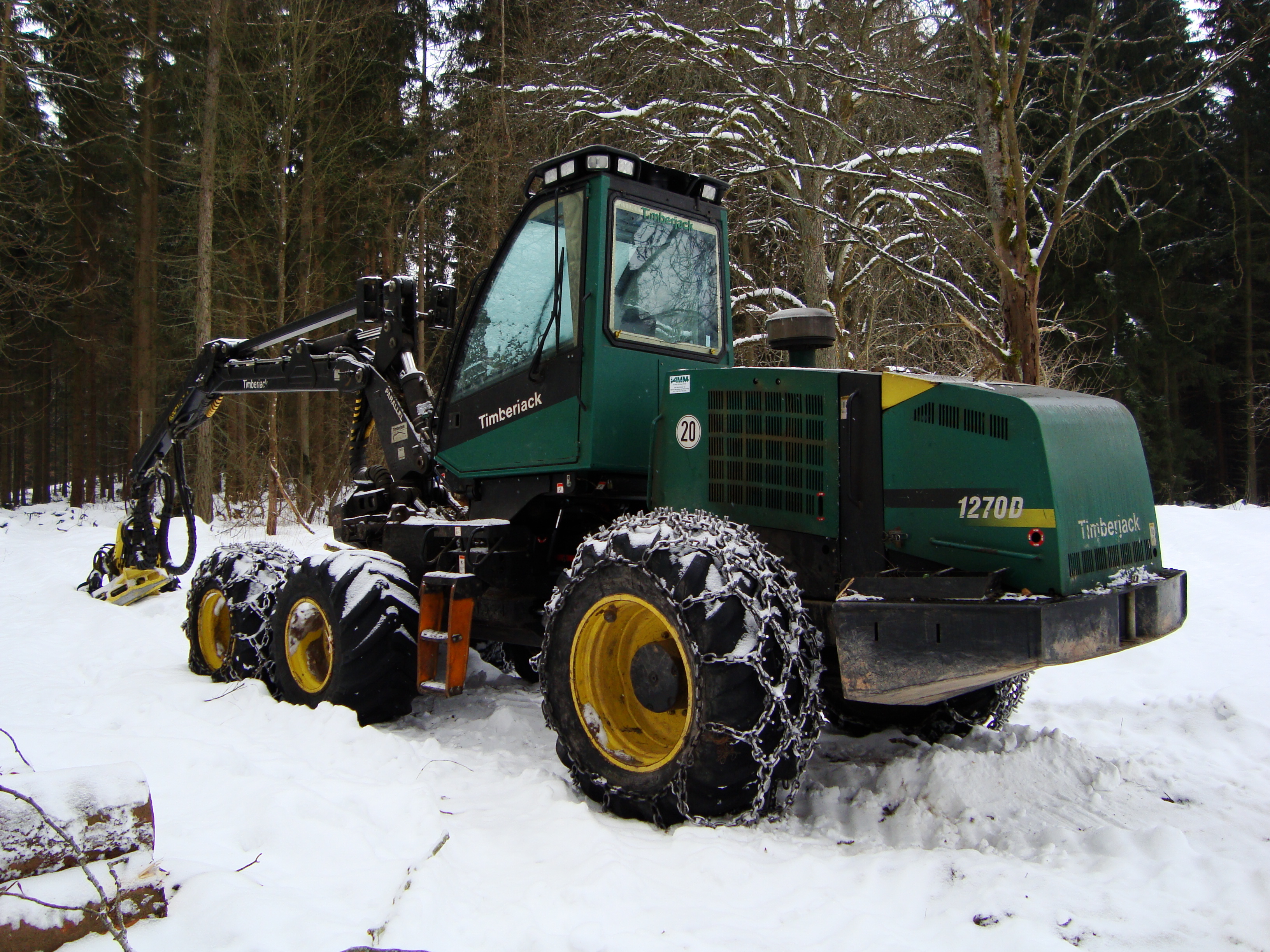 Timberjack-Harvester 1270D in Bayern, Deutschland